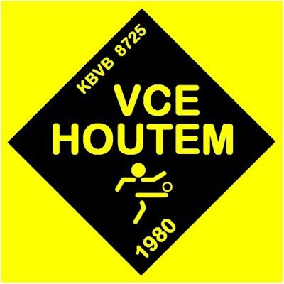 Logo van voetbalclub Eendracht Houtem uit Sint-Lievens-Houtem, Oost-Vlaanderen.